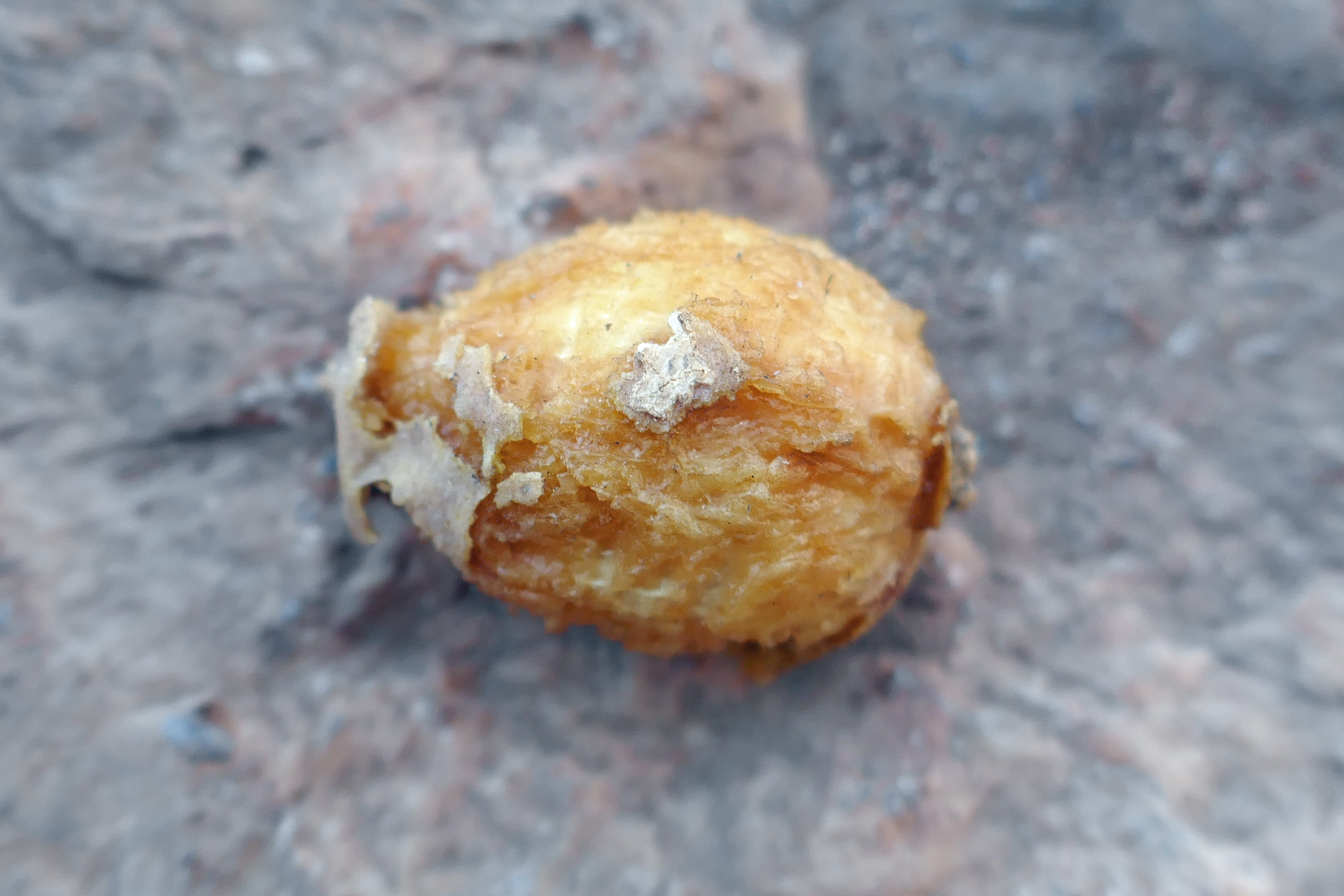 Balanites aegyptiaca au Parc national de la Pendjari (Bénin).